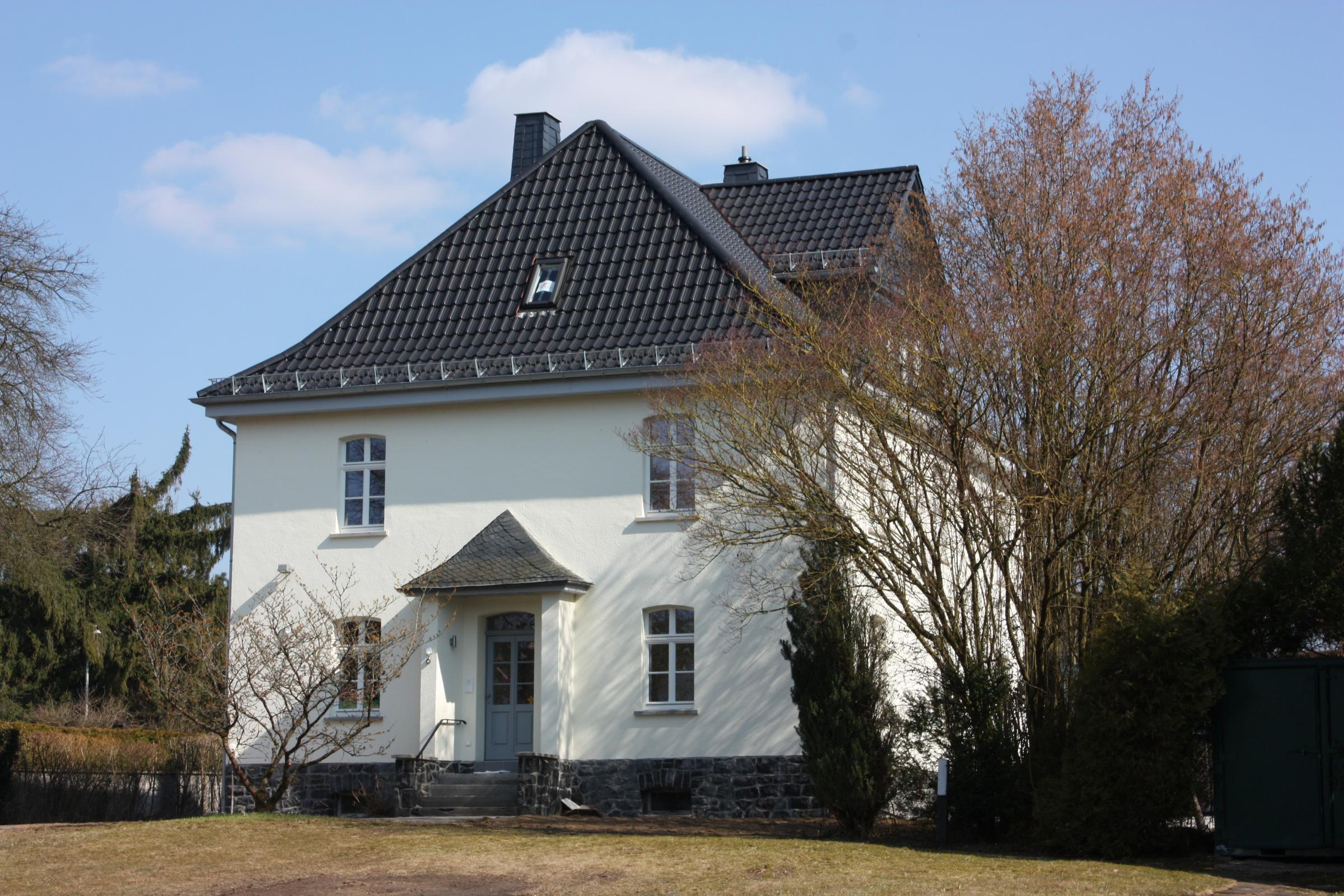 Pfarrhaus in Hausen, Westerwald (Waldbrunn), Hessen, Deutschland